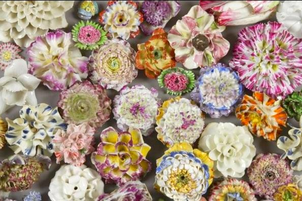 Fleurs en porcelaine, Manufacture de Vincennes, XVIIIe siècle, France